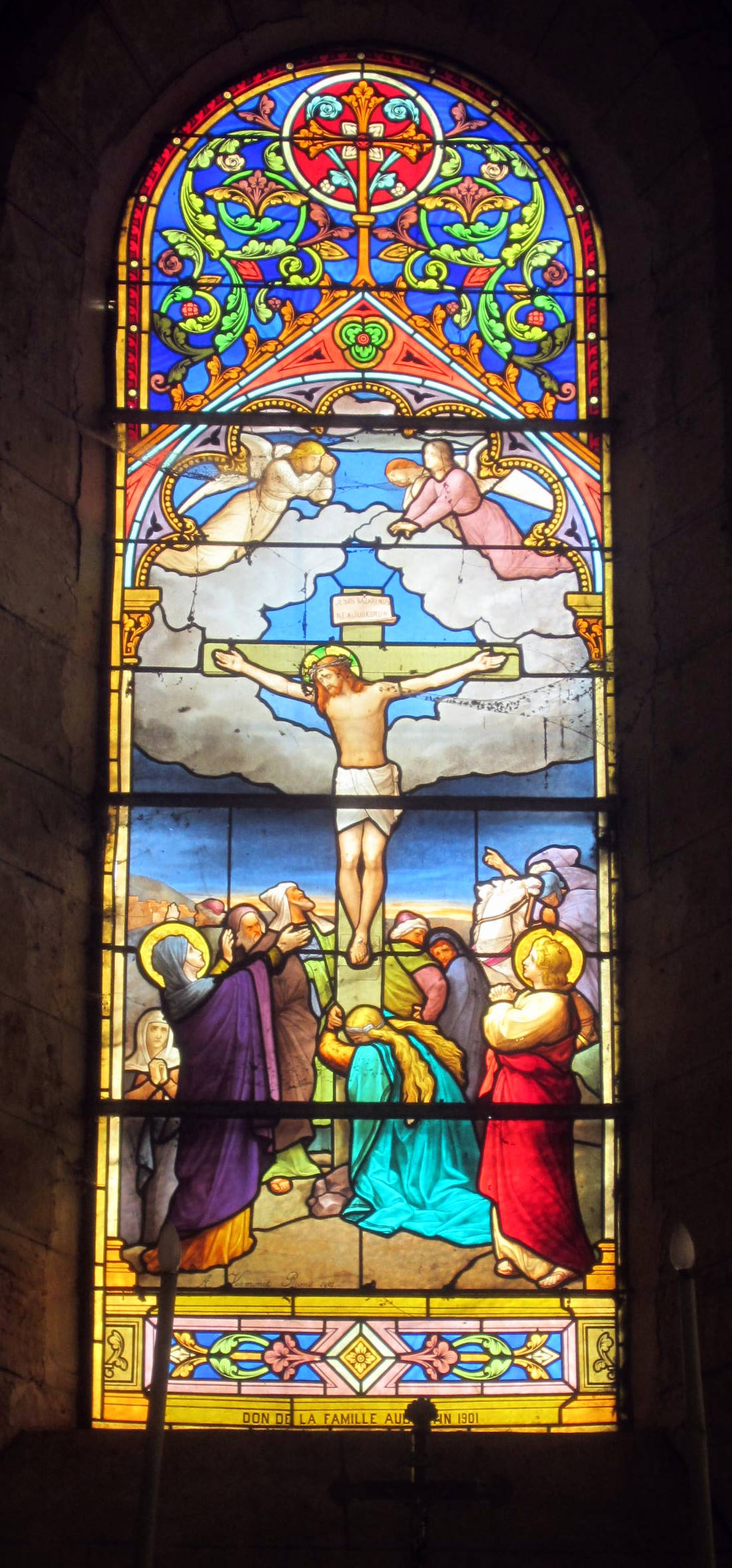 Vitrail central derrière l'autel dans le cœur de l'église, il est indiqué à sa base don de la famille Aubertin 1801